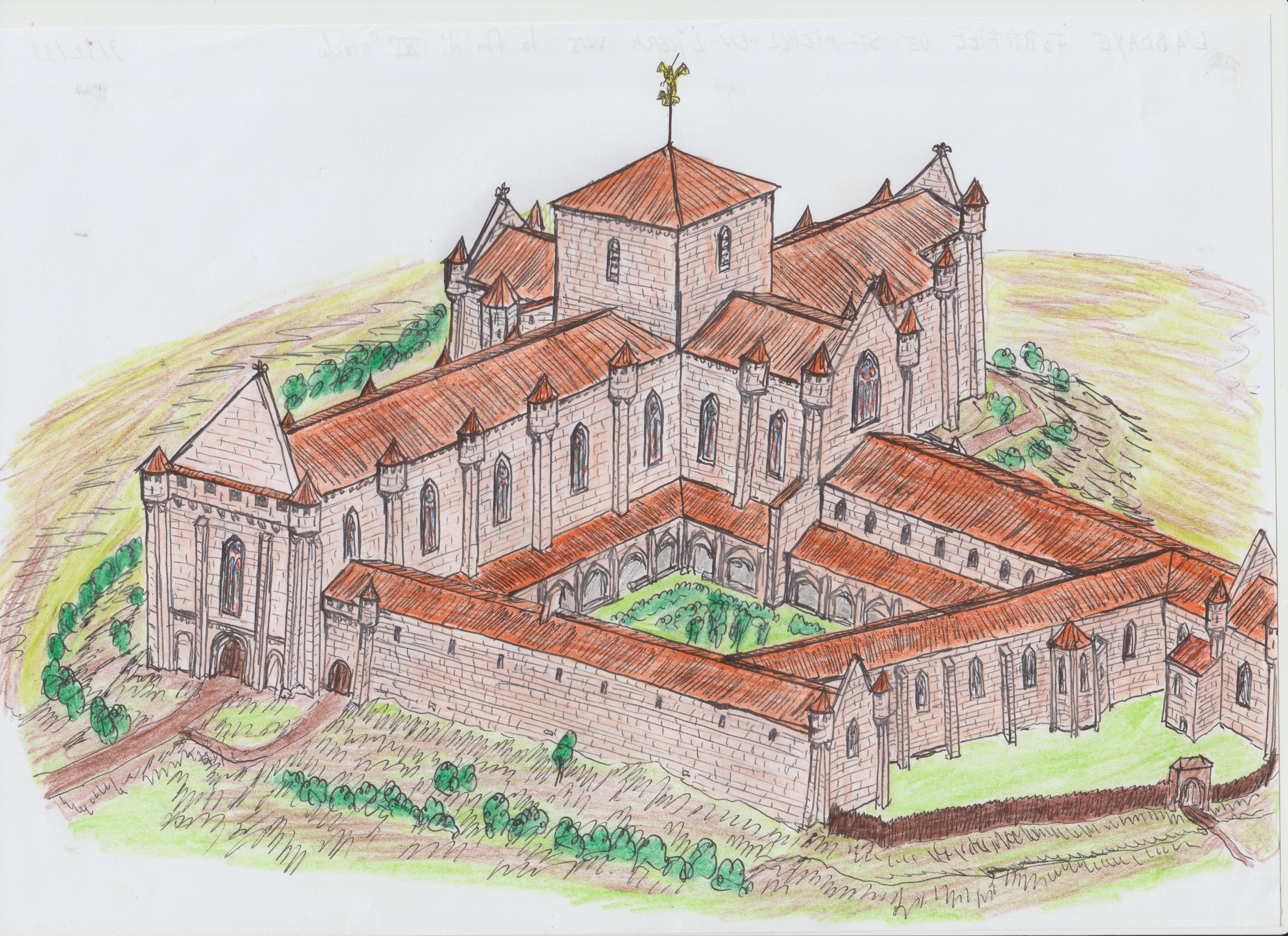 Dessin en couleurs montrant une vue aérienne de l'abbaye de Saint Michel en l'Herm telle qu'elle devait apparaître dans la deuxième moitié du XVe siècle.